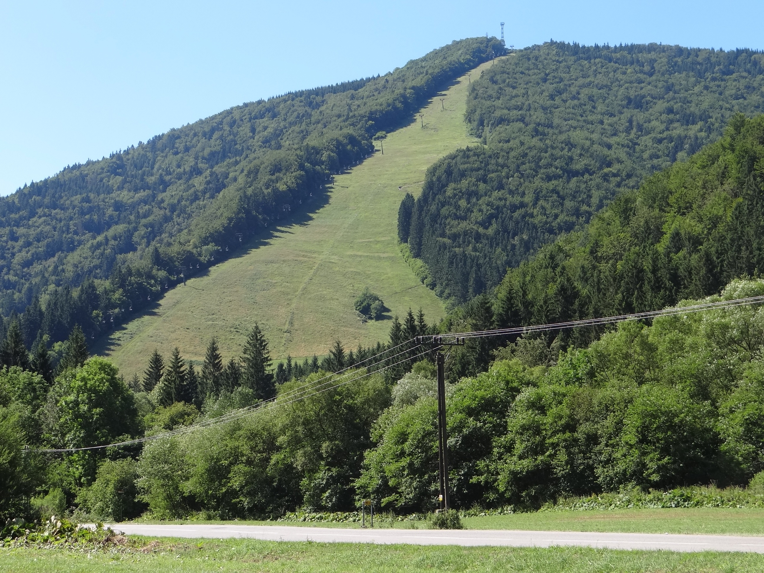 Magurka (Malá Fatra)